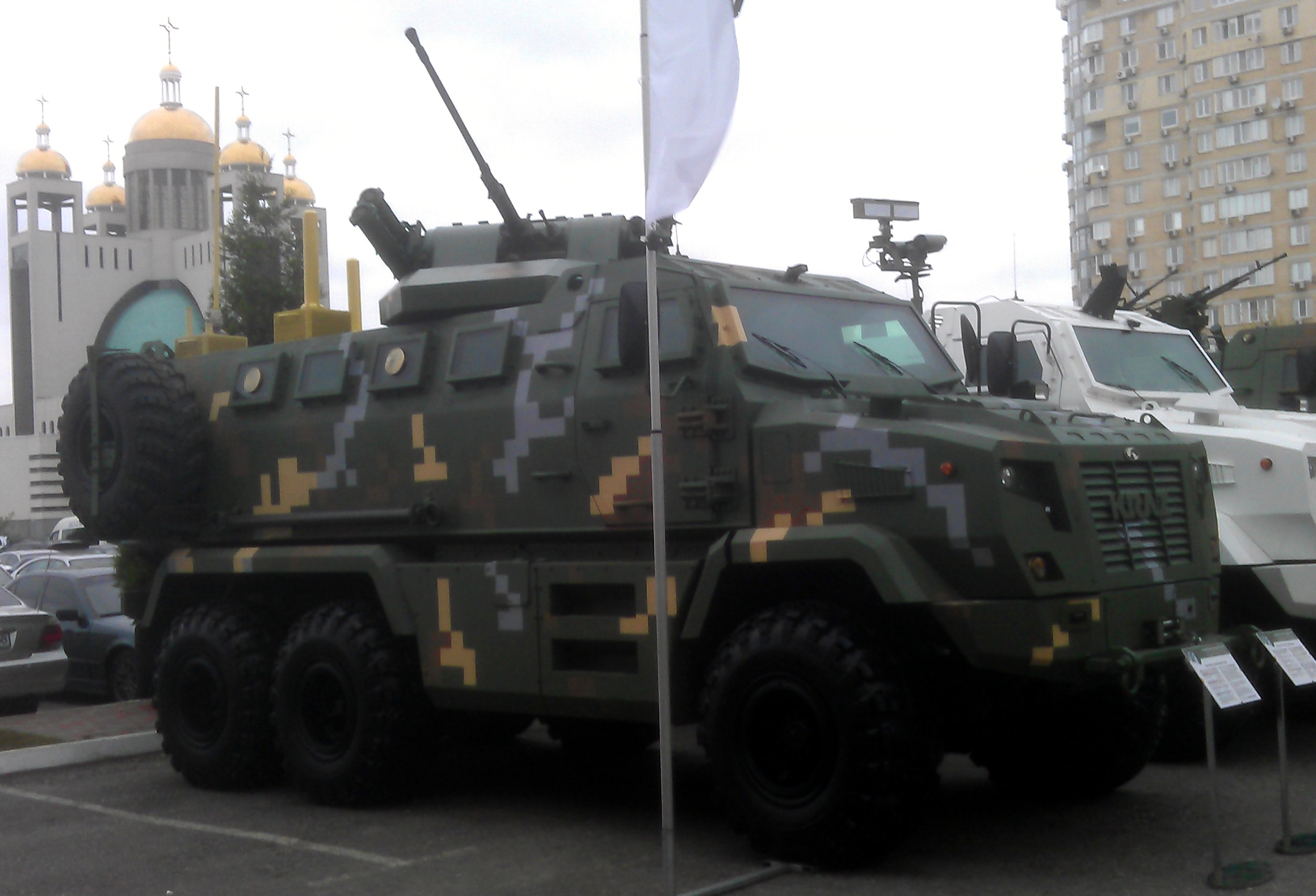 Бронеавтомобиль KRAZ Feona с боевым модулем на стенде автозавода «КрАЗ» выставки «Зброя та безпека» («Оружие и безопасность»), Киев, октябрь 2016 года.